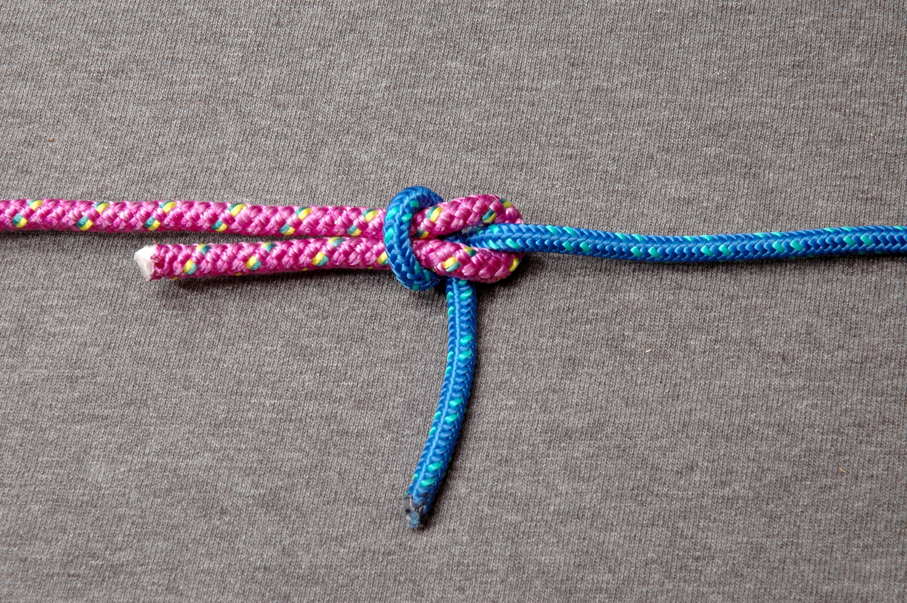 Sheet bend (ABOK #1431)